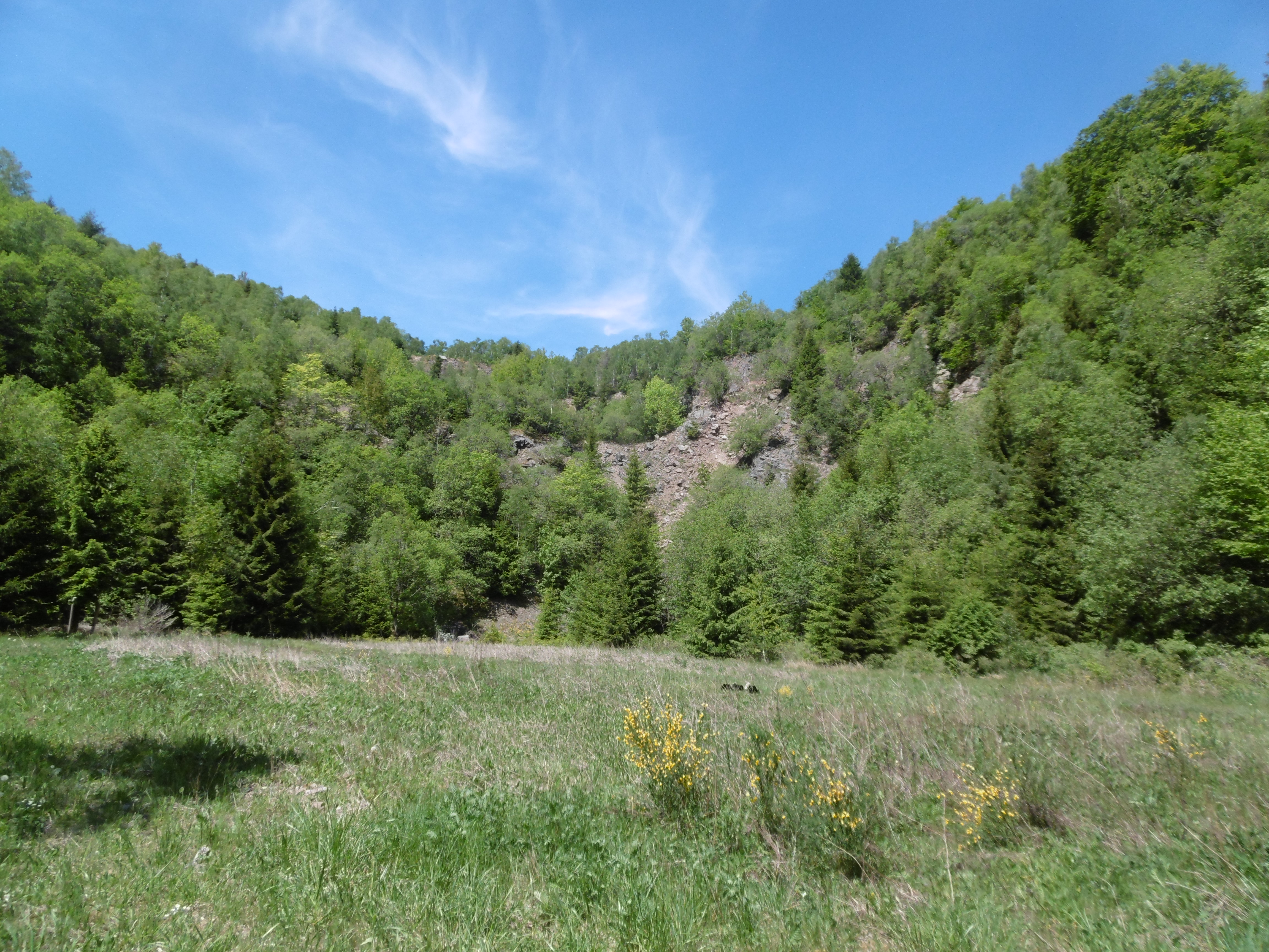 Naturschutzgebiet Auf dem Saal​ von Süden.